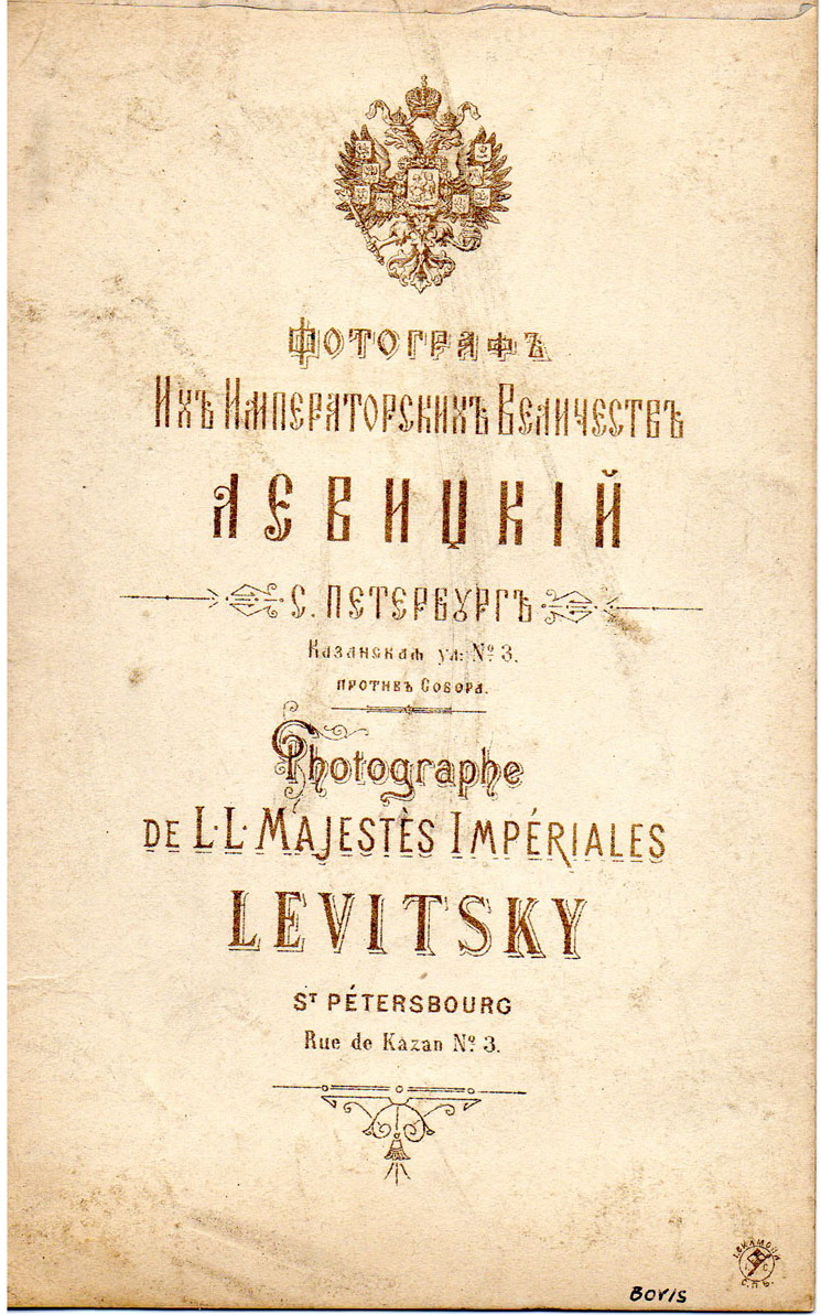 Обратная сторона фотокарточек Левицкого